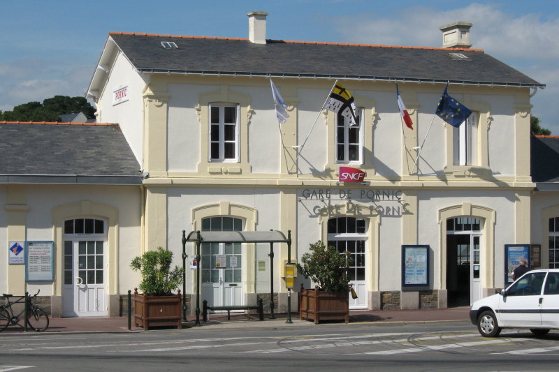 Bâtiment voyageur de la gare de Pornic, Loire-Atlantique, France